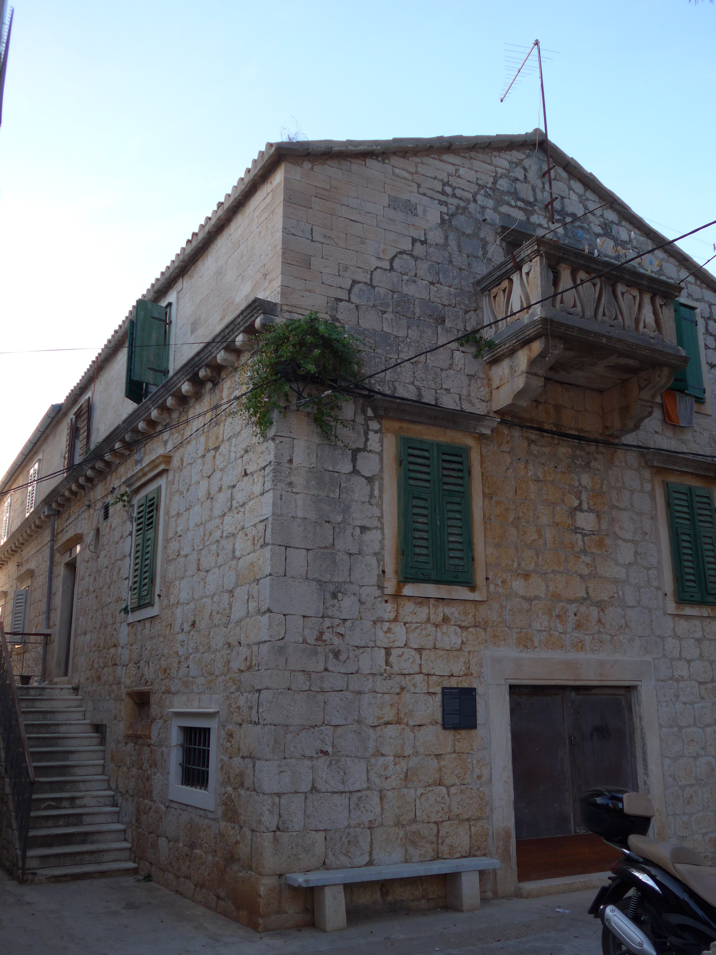 Vis, Kroatien